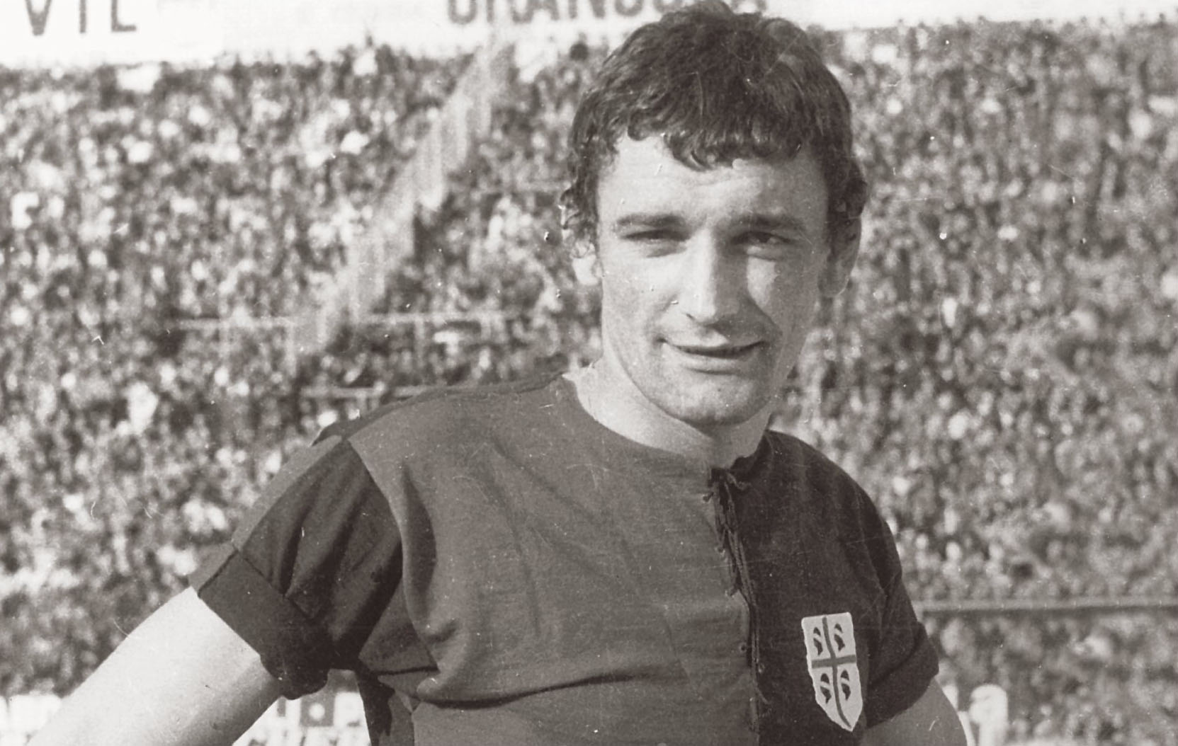 Il calciatore italiano Luigi "Gigi" Riva al Cagliari tra gli anni 60 e 70 del XX secolo.